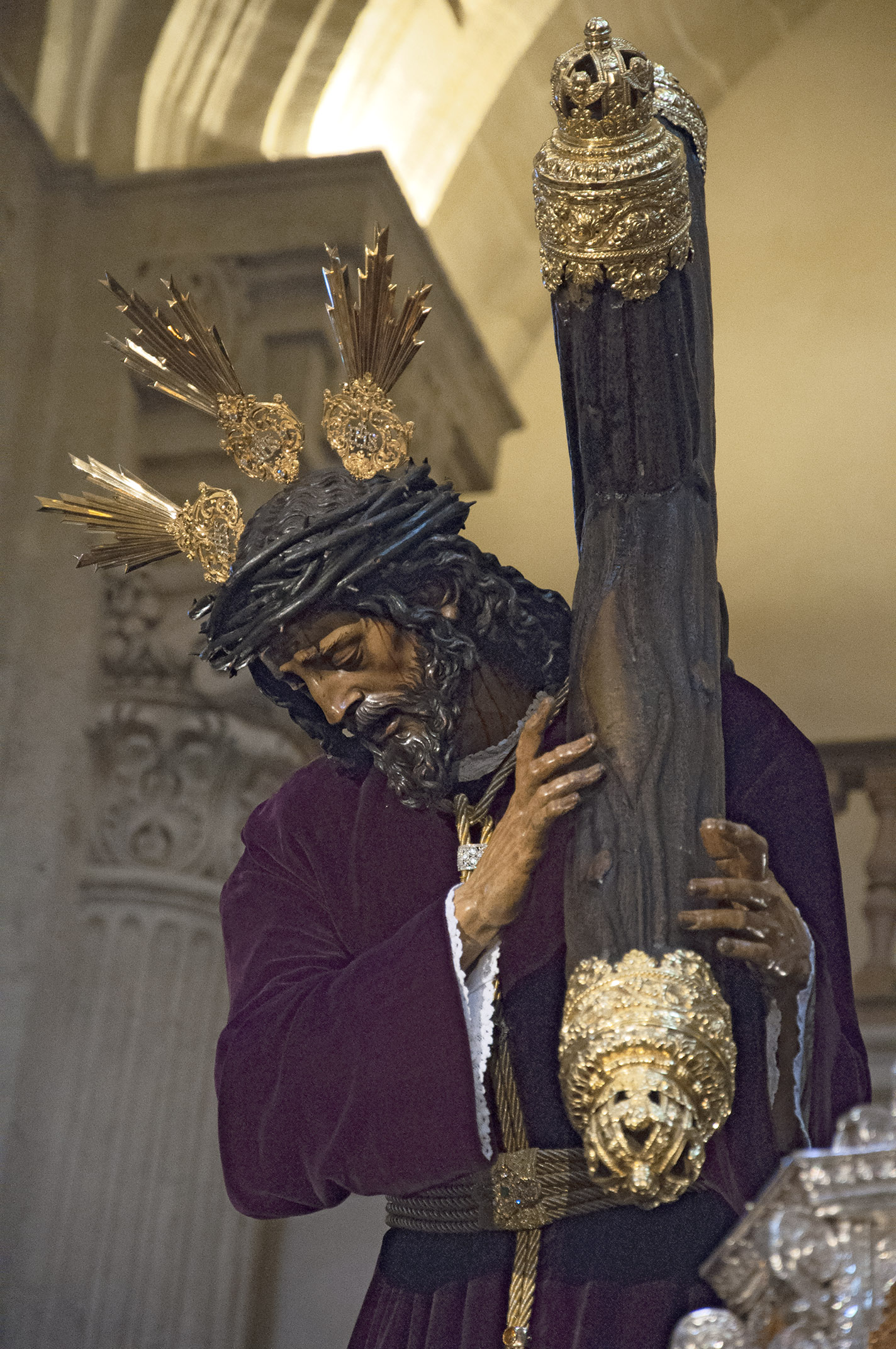 Nuestro Padre Jesús de la Pasión de la Hermandad de Pasión de Sevilla